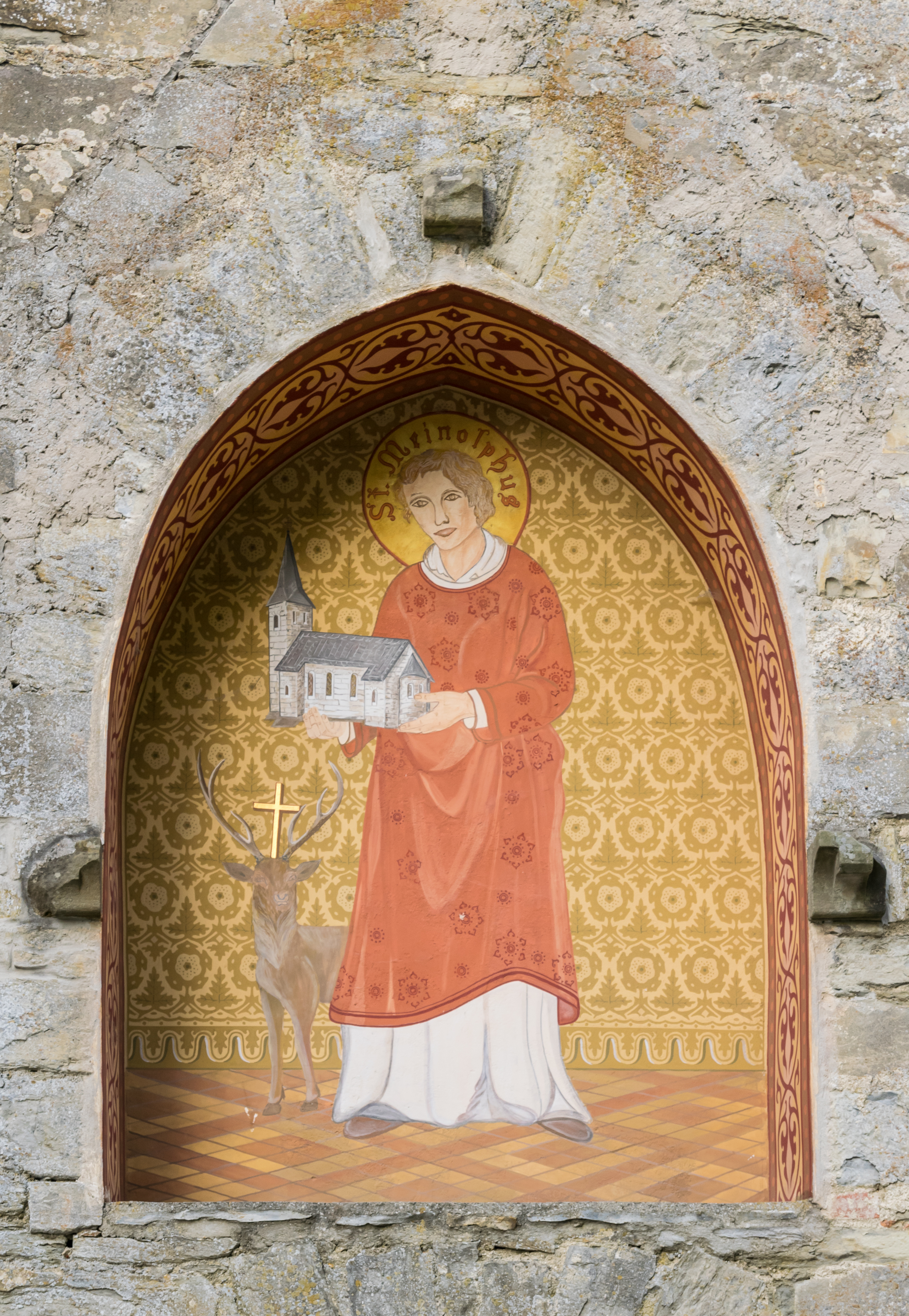 Gut Böddeken, ehemaliges Kloster in Büren, Kreis Paderborn